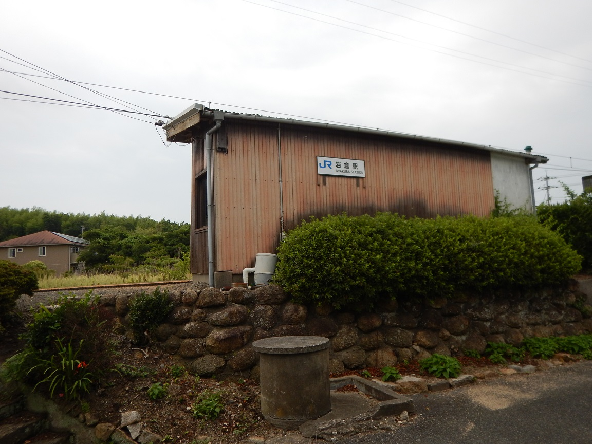 JR岩倉駅待合室（2019年6月）